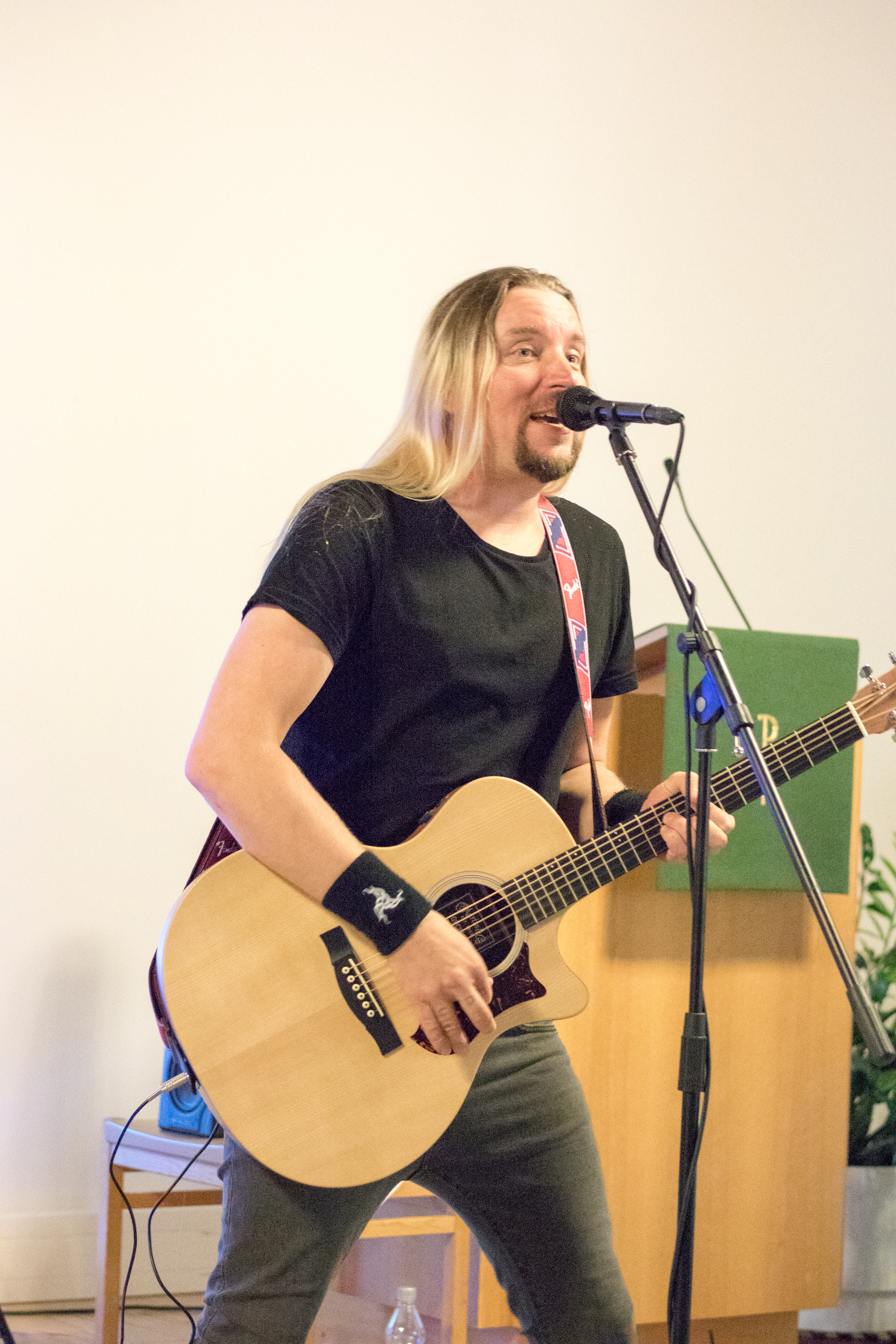 Miika Partala suomalainen kitaristi